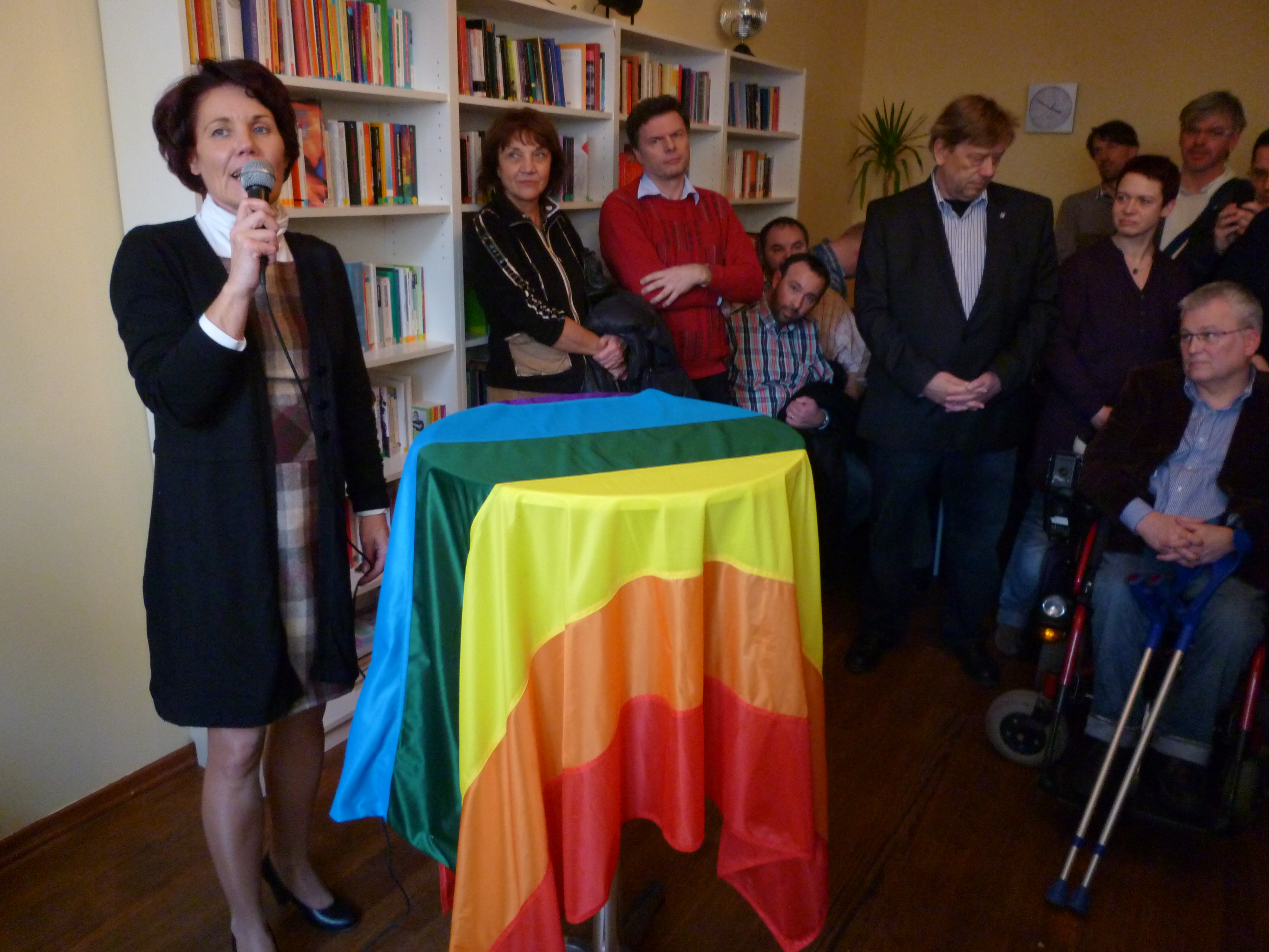 Eröffnungsfeierlichkeiten des Andersraum in der Asternstraße, Hannover-Nordstadt